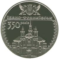 Монета 350 років м.Івано-Франківську реверс